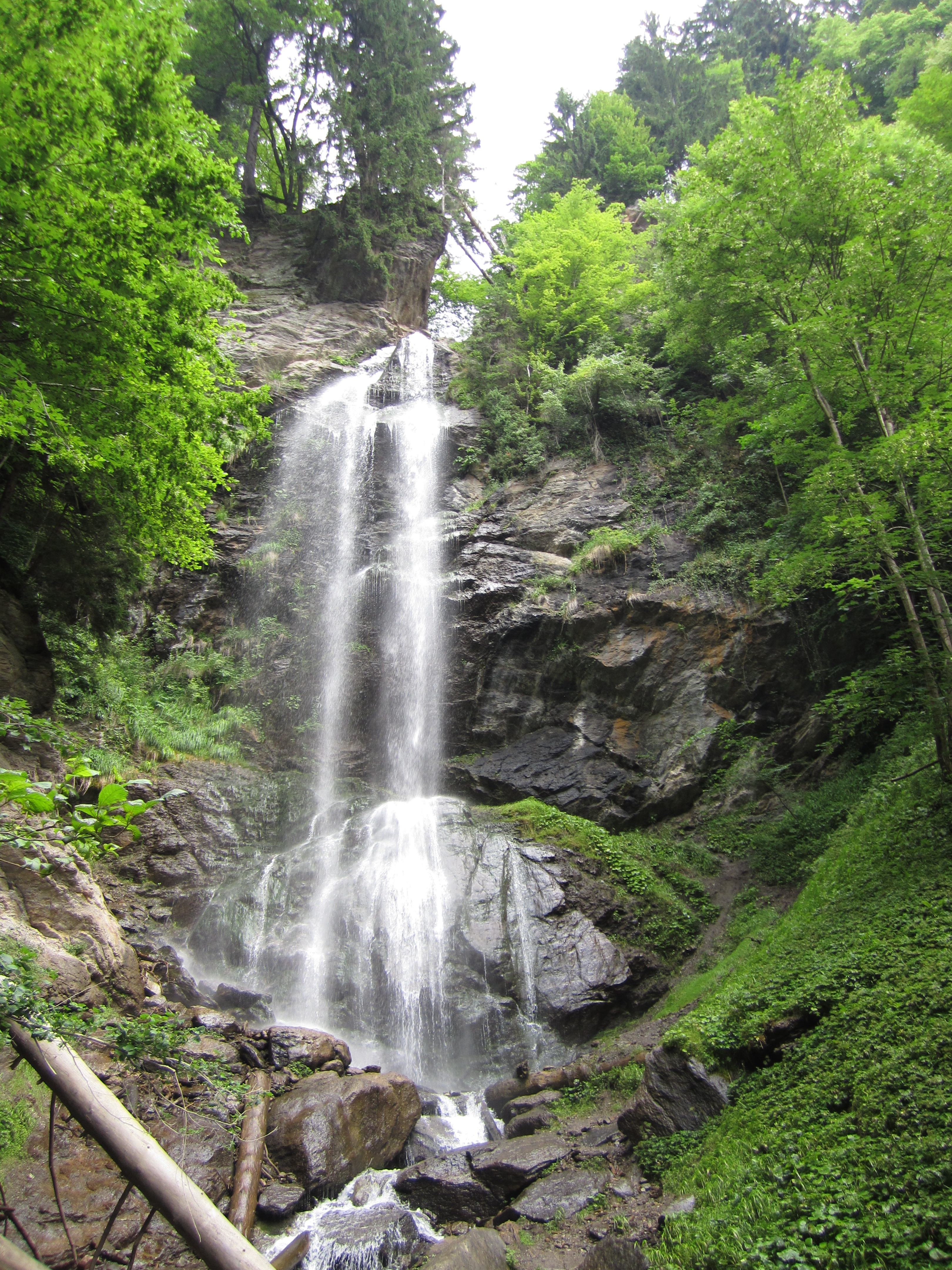 Finsterbachfälle nahe Sattendorf am Fuße der Gerlitzen